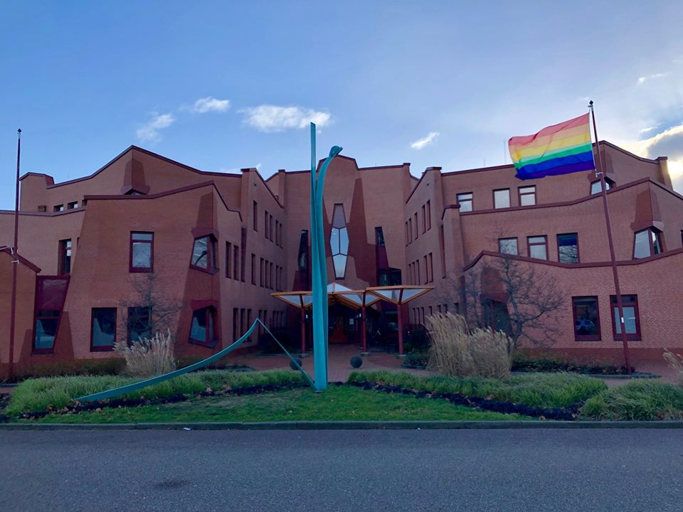 Wormerland hijst de regenboogvlag tijdens het bekendmaking van de Nashvilleverklaring